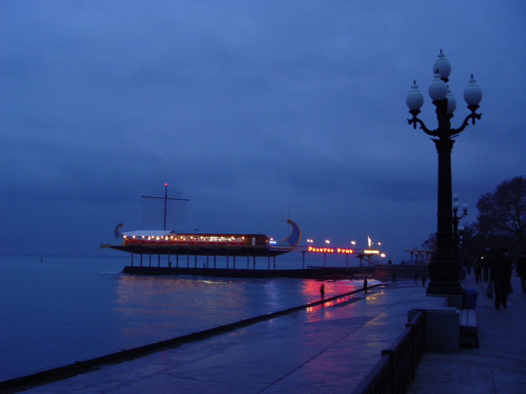 Золотое руно в Ялте